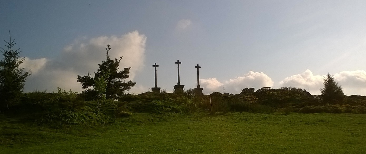 montregard5